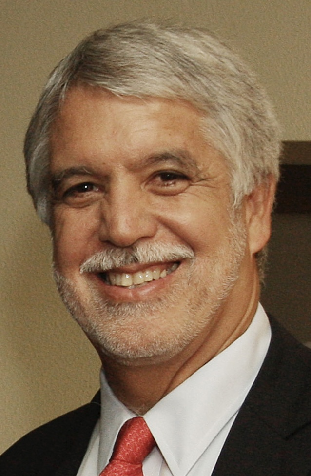 Prof. Dr. Carlos Alexandre Netto, reitor da UFRGS, e Enrique Peñalosa